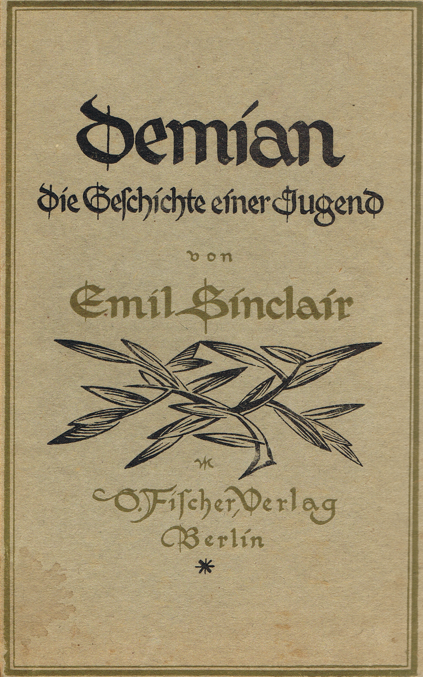 Cover der Erstausgabe